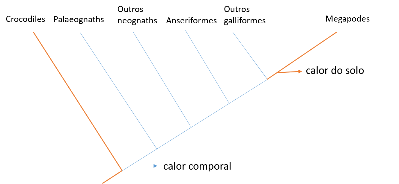 Cladograma evidenciando o tipo de incubação dos ovos de aves e répteis, mostrando uma provável reversão desse caráter nos megapodes